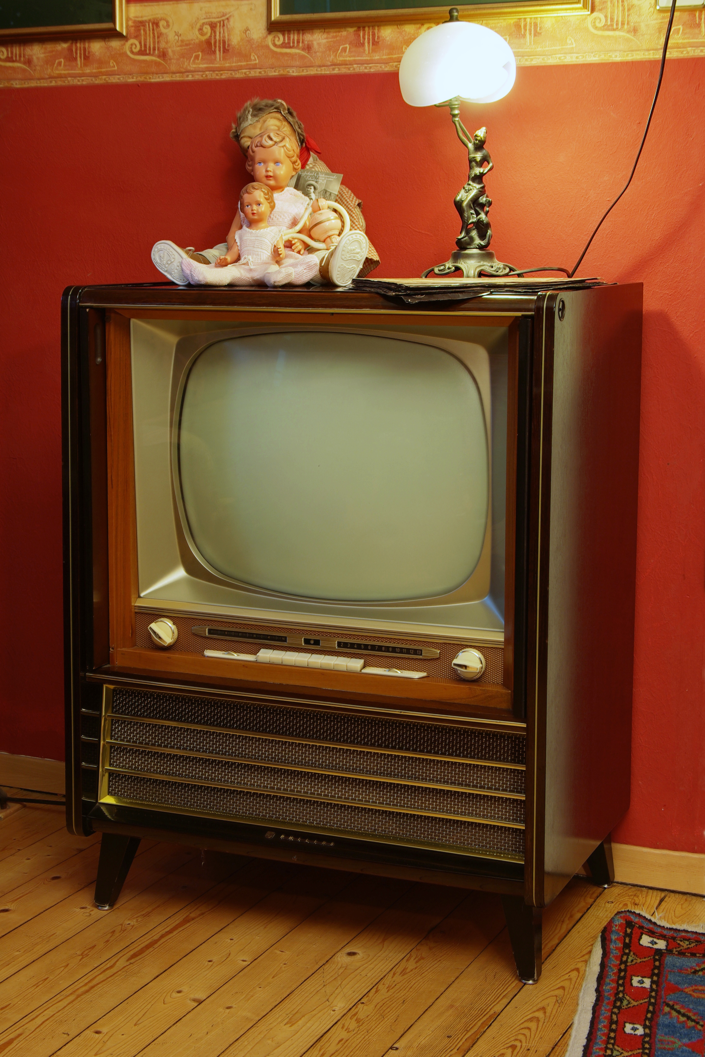 Philips Lenardo Fernseher von ca. 1959